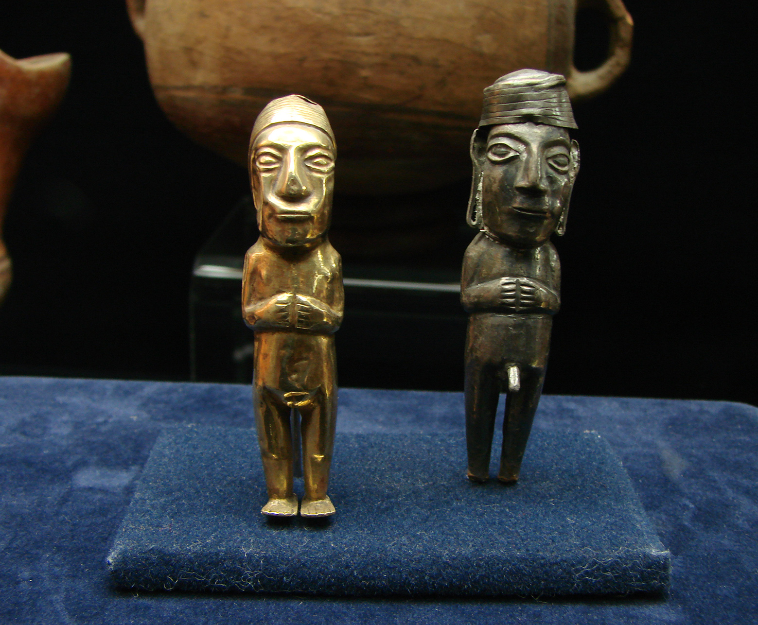 Statuettes inca, or et argent.Musée d'Auch.